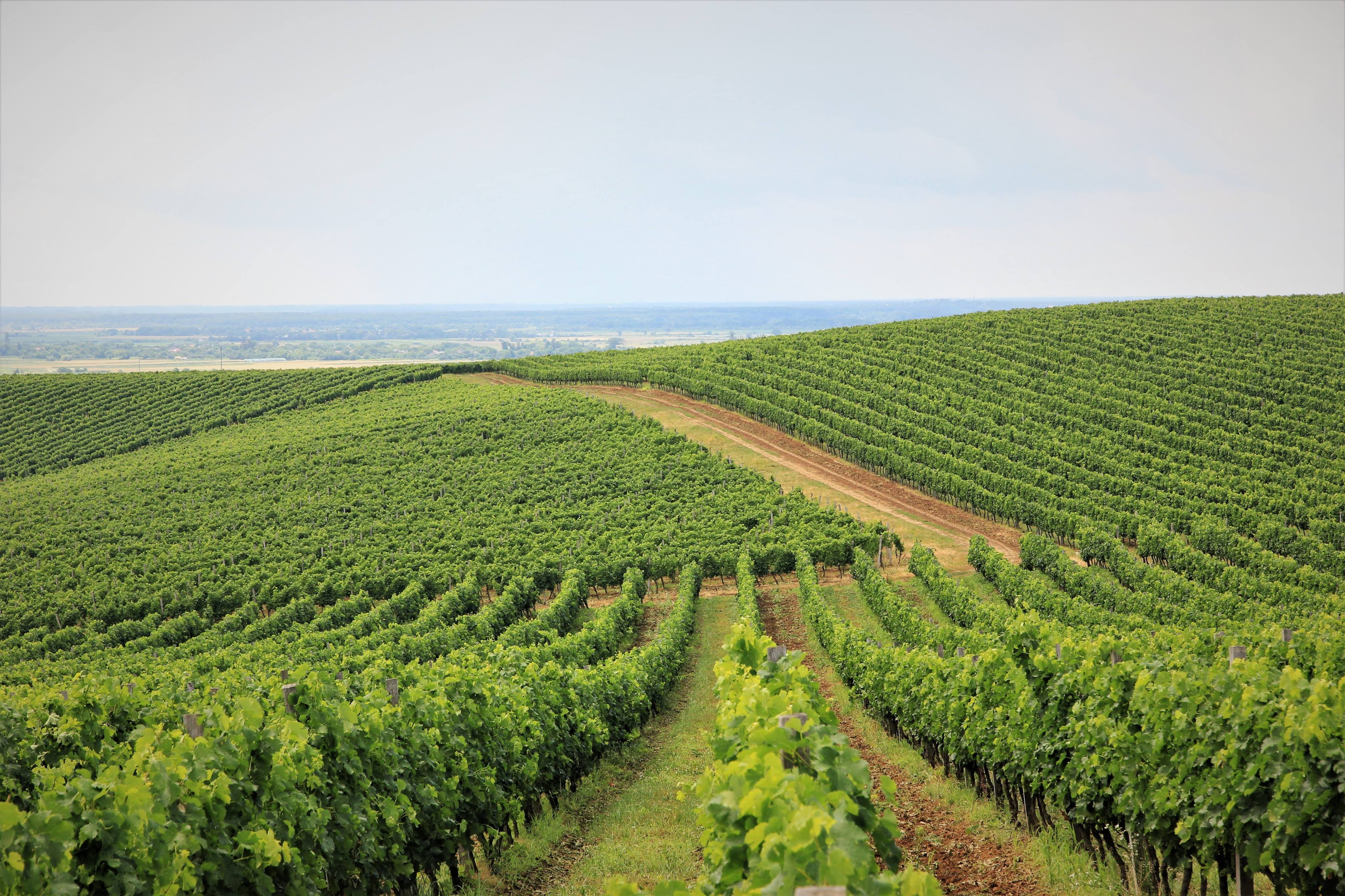 Мікротеруар Малої Гори вважається найкращим на Закарпатті